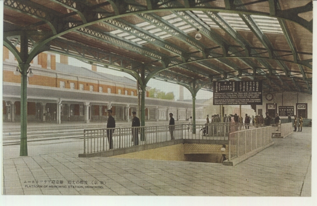 满洲国新京站，即中国吉林省长春市长春火车站旧照